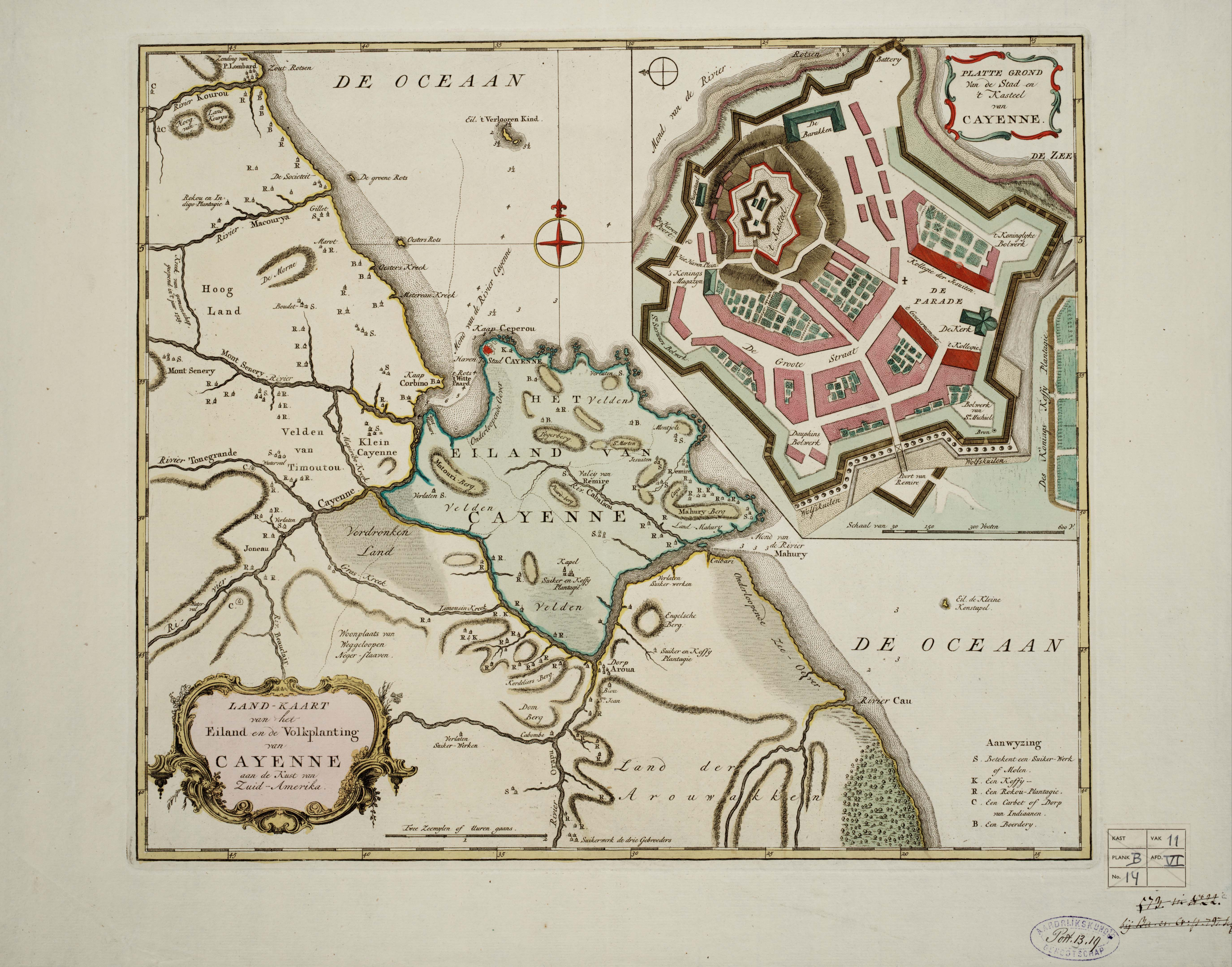 Land-kaart van het eiland en de volksplanting van Cayenne